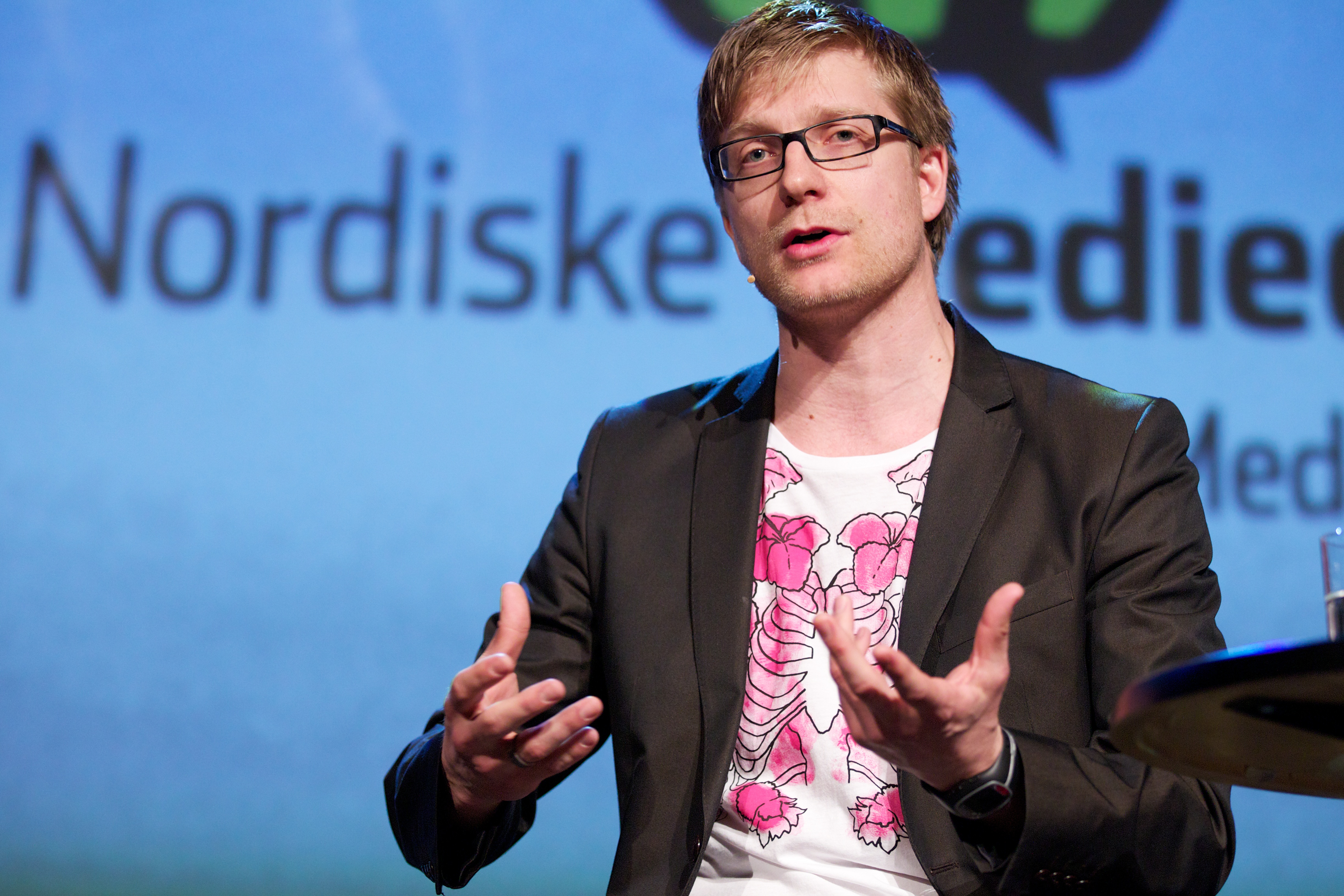 PR i praksis. Foto: Eirik Helland Urke